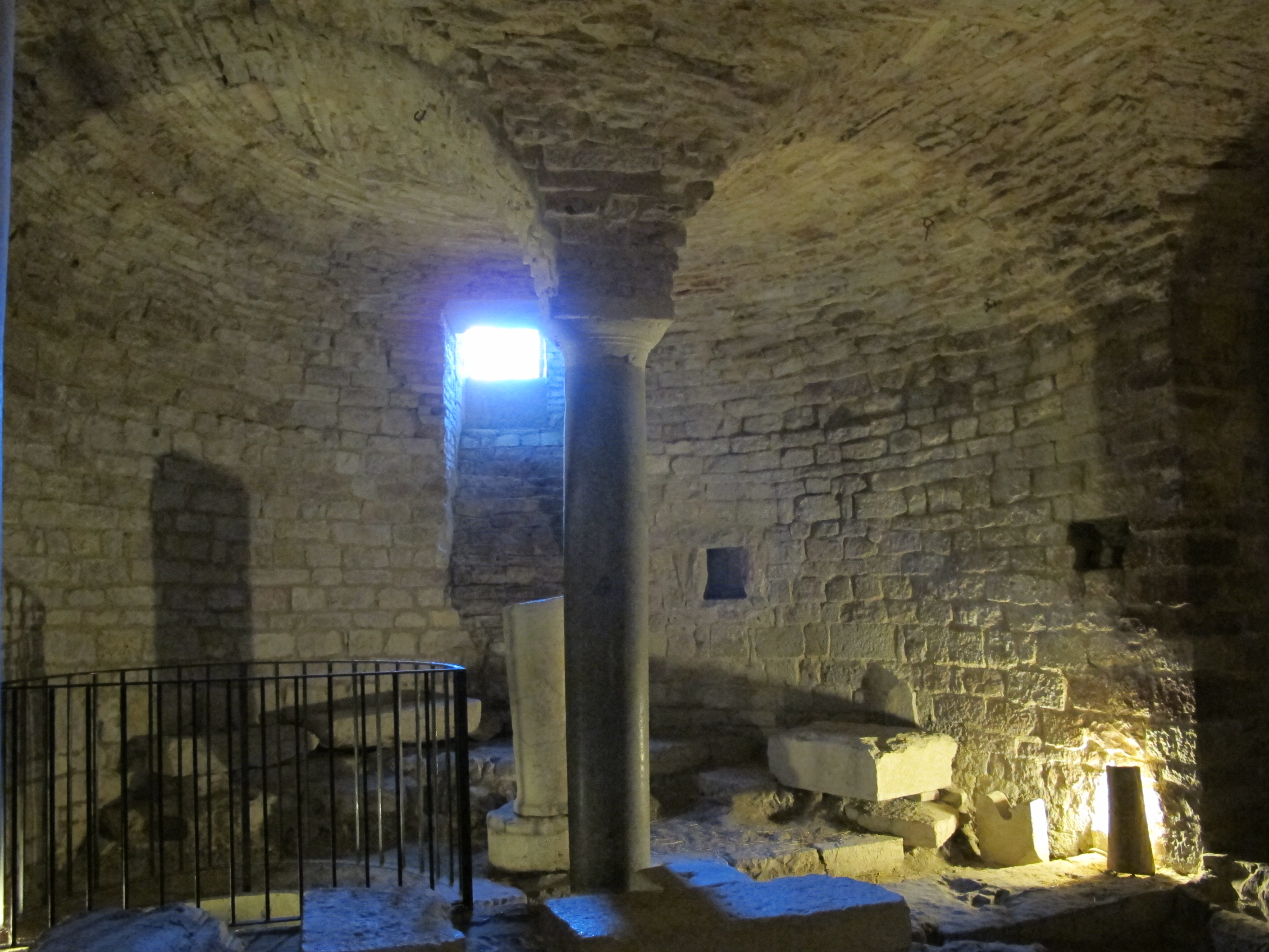 Assisi, santa maria maggiore, cripta